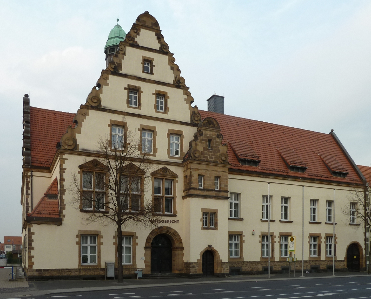 Amtsgericht in Grevenbroich (Neorenaissance)